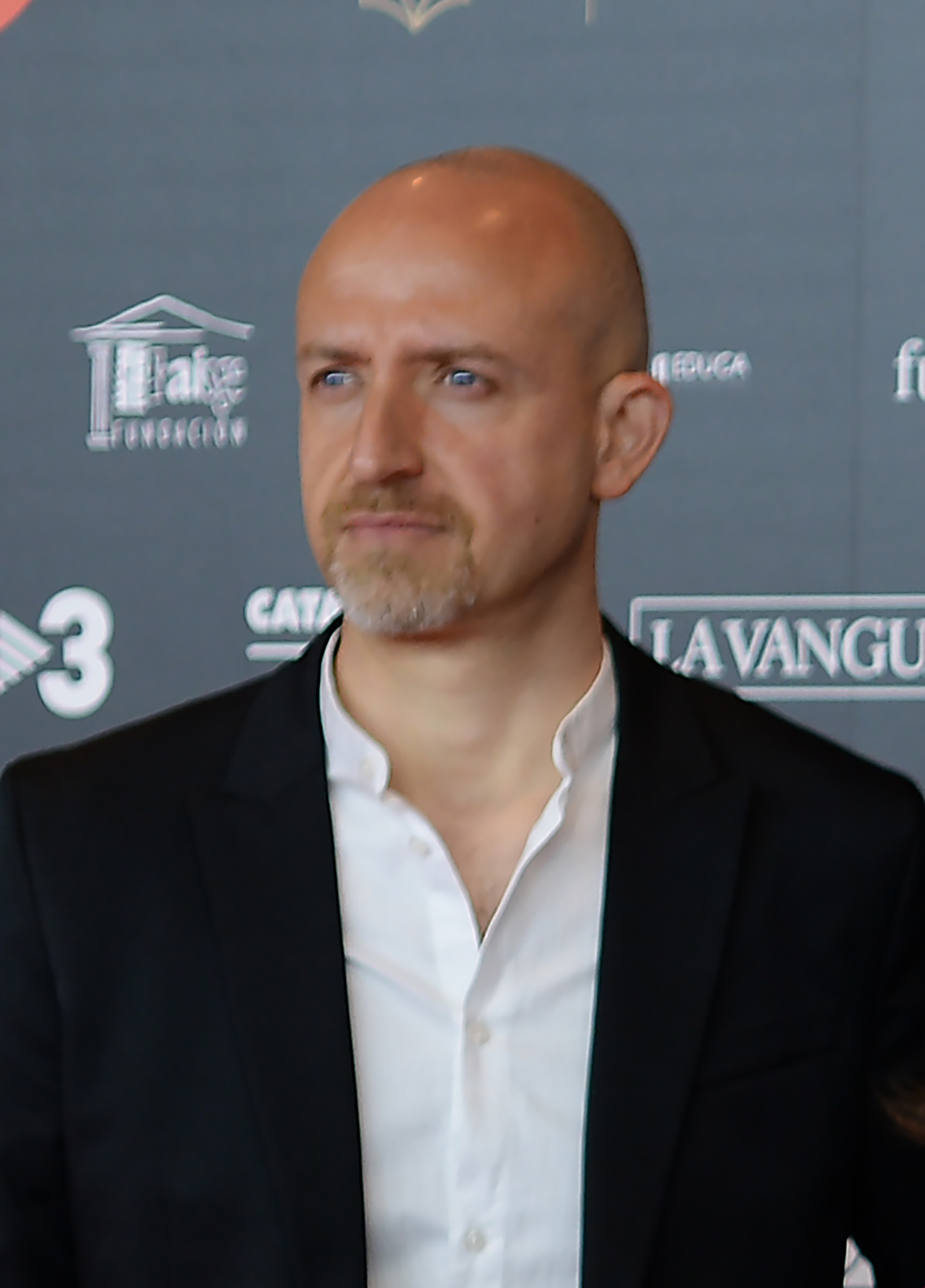 Esteve Soler Miralles, director de cinema i dramaturg, XII Premis Gaudí (2020)